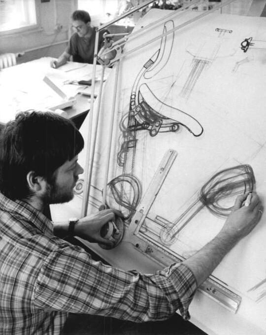 Halle, Design-Atelier, Designer am Zeichenbrett ADN-ZB Lehmann 26.8.87 Halle: Design-Atelier-Moderne, neue Industrie- und Konsumgüter mit hohem ästhetischen Niveau und verbesserten Gebrauchswerten sind das Arbeitsfeld der Formgestalter, Konstrukteure und Modellbauer im Atelier Halle des VEB Designprojekt Dresden. Hier entstehen seit Gründung der Einrichtung vor vier Jahren Studien und Projekte vorwiegend für Neuentwicklungen von Konsumgütern aus Betrieben der bezirksgeleiteten Industrie der Bezirke Halle und Leipzig sowie für weitere große Kombinate. Formgestalter Hartmut Weise entwickelt eine konstruktive Lösung für einen abgepaßten Arbeitsstuhl. - siehe auch 1987-0826-4N